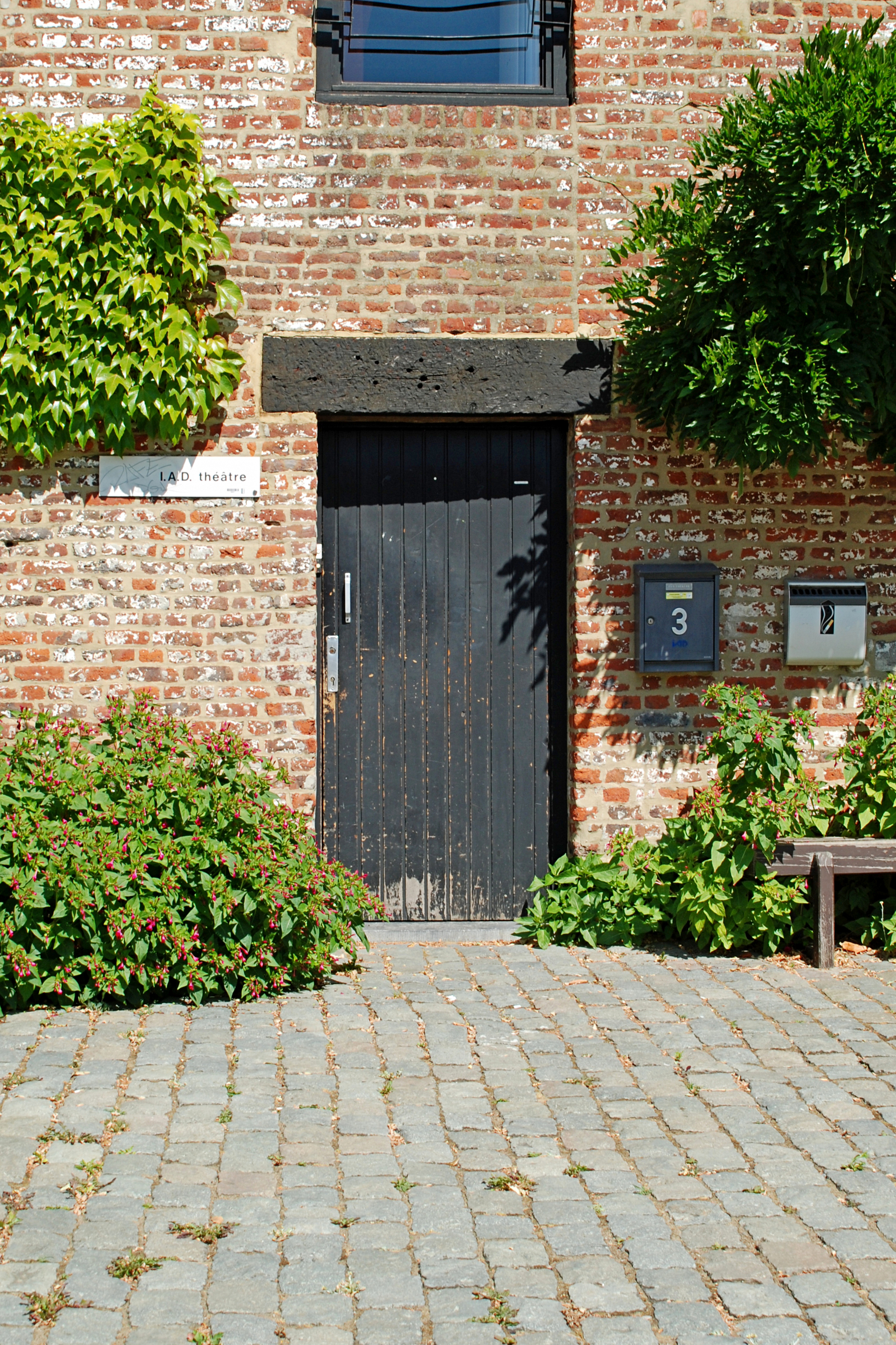 Belgique - Brabant wallon - Ottignies-Louvain-la-Neuve - Ferme de Blocry (Place de l'Hocaille) This photo of immovable heritage has been taken in the Walloon Region